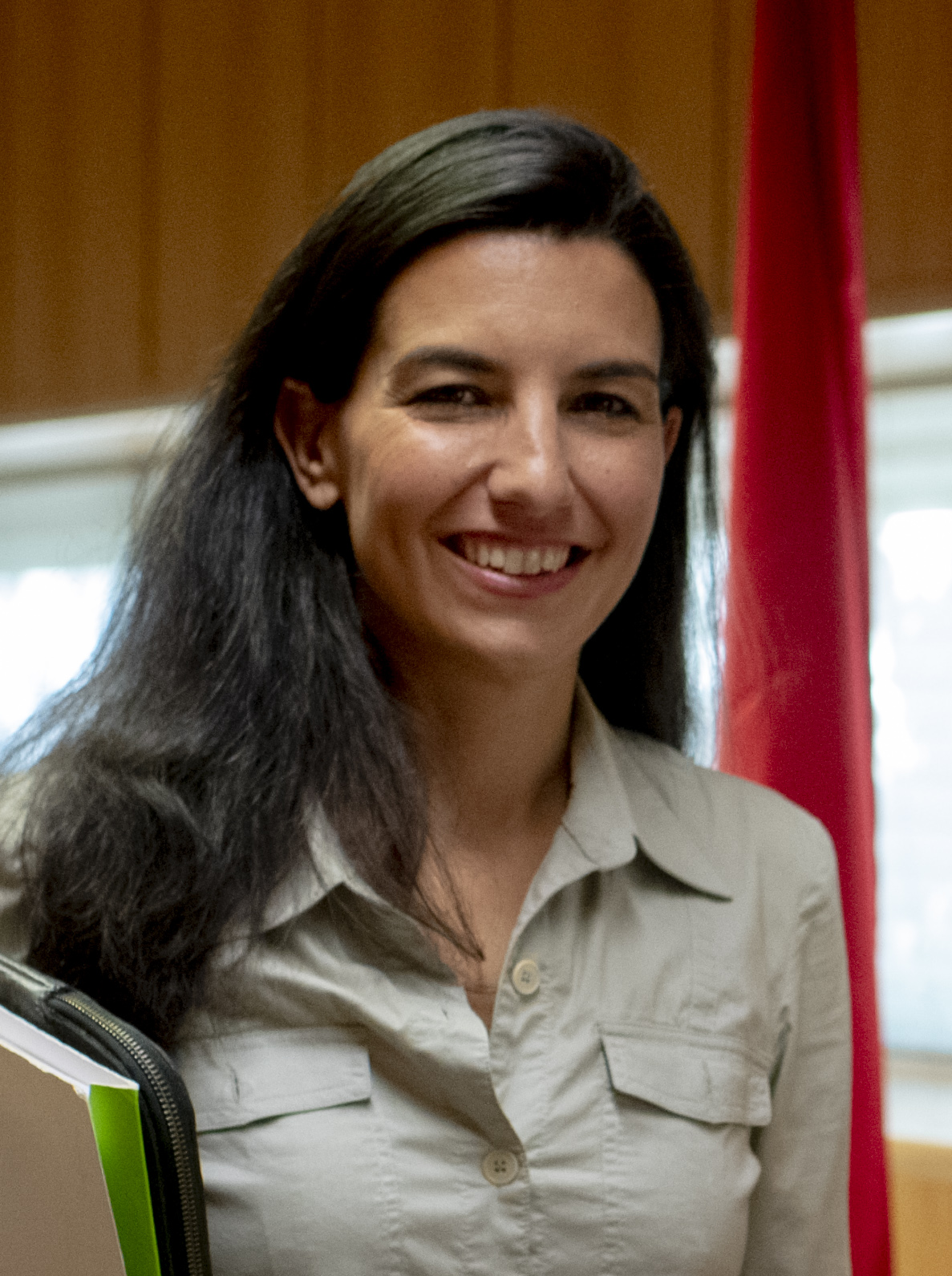 Reunión entre Ayuso y Monasterio